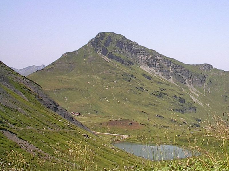 La Pointe de Chésery vue côté Suisse (Au premier plan, le Lac Vert) Photo J.J.Roland (07.08.2003)